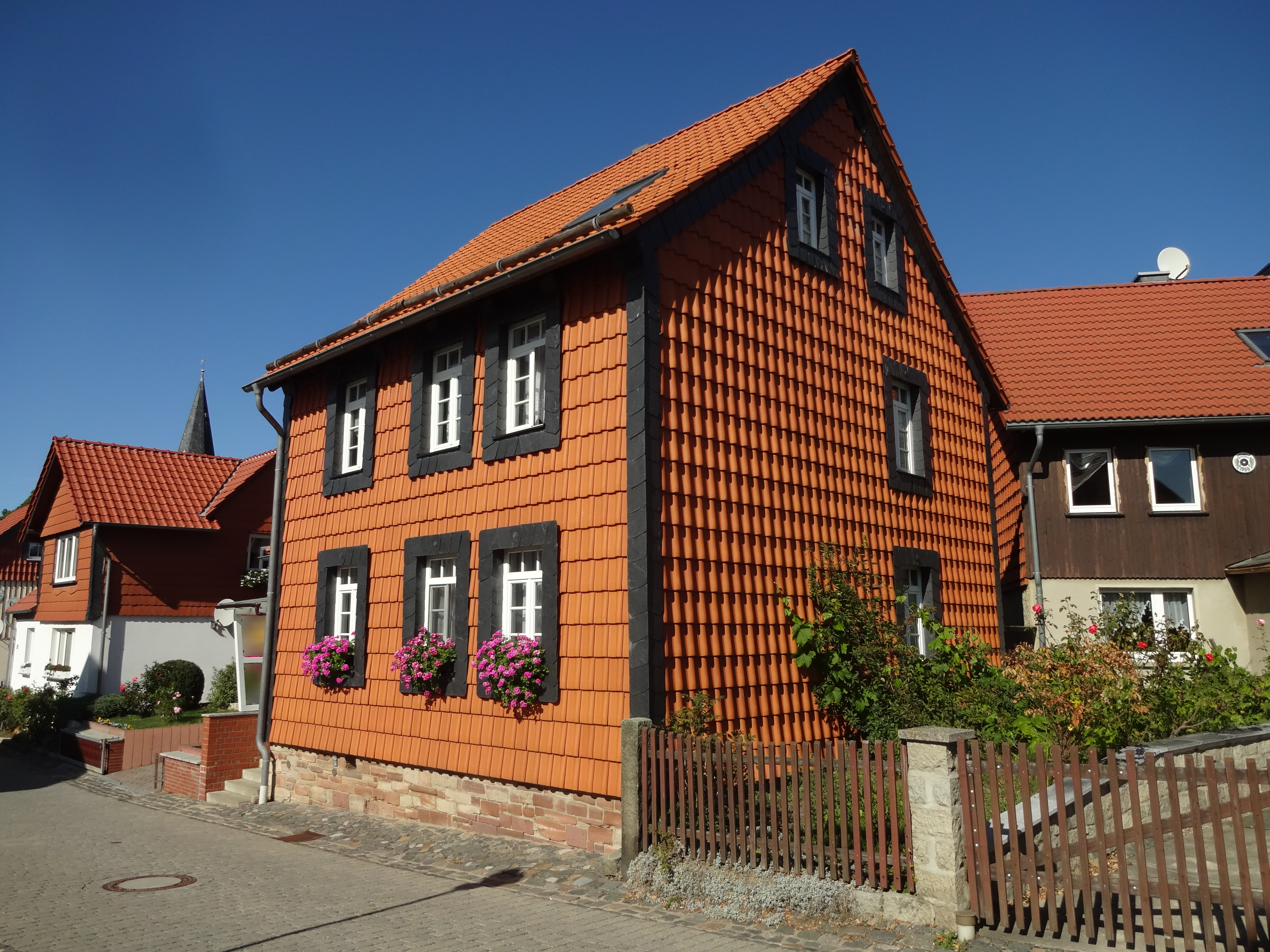 denkmalgeschütztes Wohnhaus in der Hauptstraße 28 in Drübeck